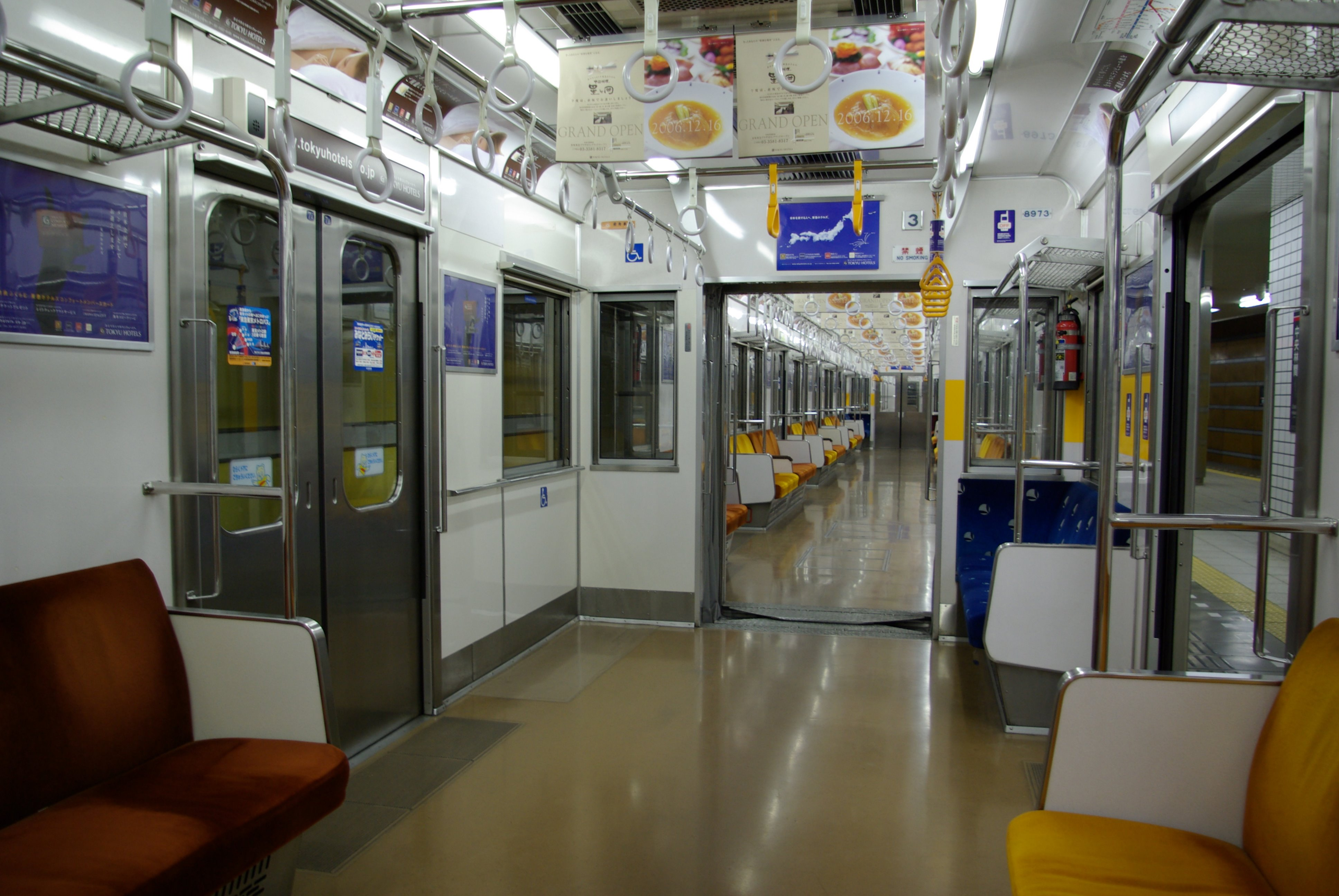 東急8500系 デハ8973号の車椅子スペース